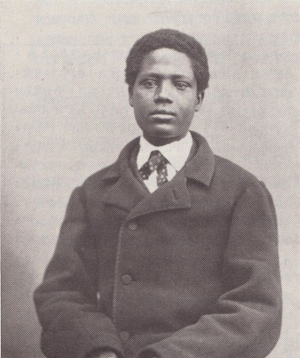 דניאל אדהנן היה יהודי-אתיופי ואחיו התאום של ברוך אדהנן אשר נשלח ללמוד בצרפת תחת חסותו של יוסף הלוי.